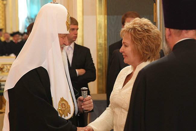 En la ceremonia de inauguración de Vladímir Putin como Presidente de Rusia, Lyudmila Putina y Cirilo I de Moscú.